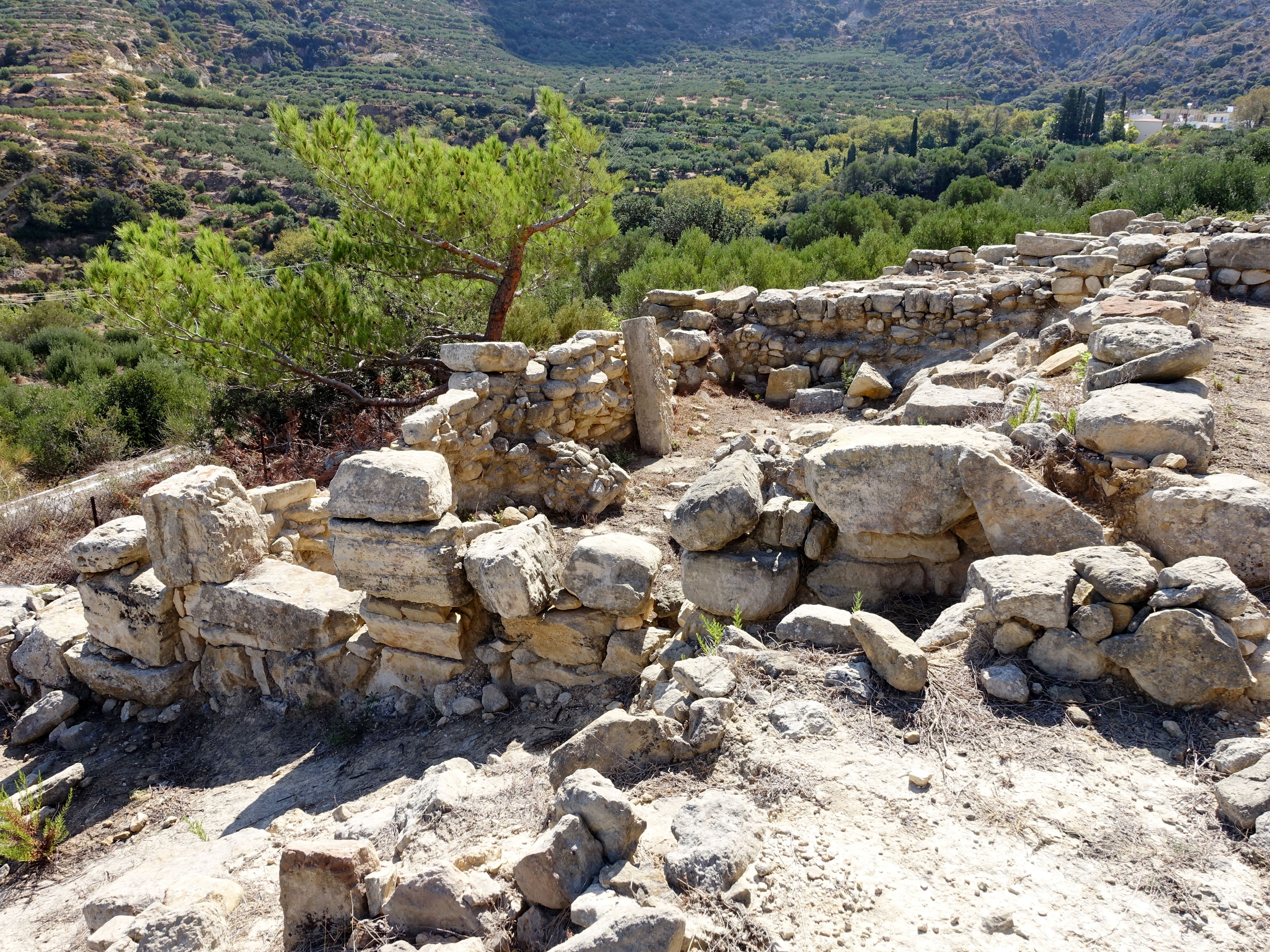 Minoische Villa von Zou (Ζου), Gemeinde Sitia, Kreta, Griechenland